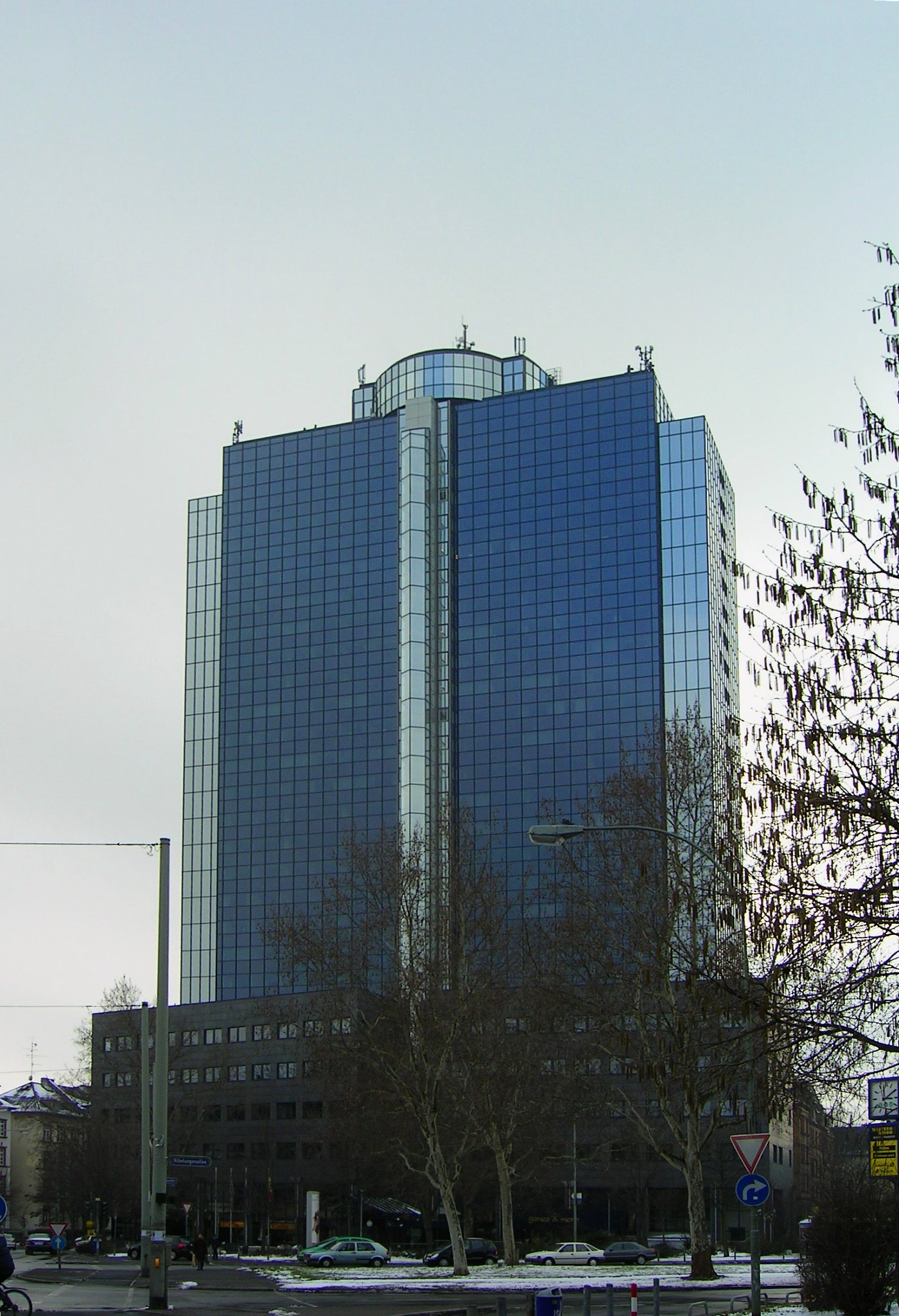 Bürocenter am Nibelungenplatz, ehemaliges Shell-Hochhaus in Frankfurt am Main.